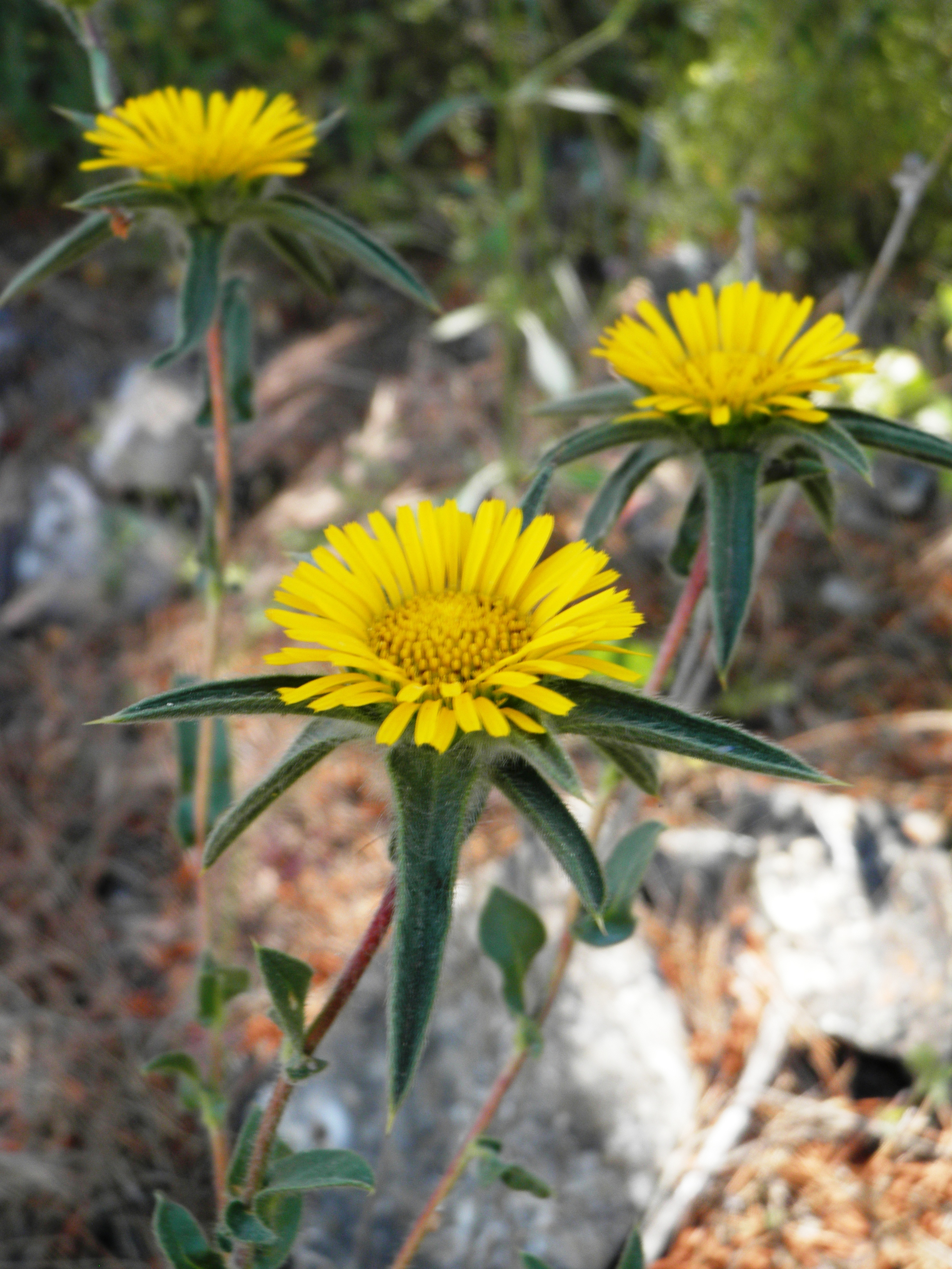 פרעושית ערביתAsteriscus (Pallenis) spinosa